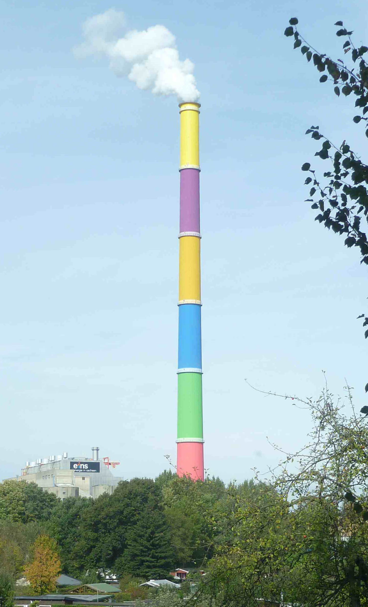 Schornstein, Heizkraftwerk Nord am 5. Oktober 2013